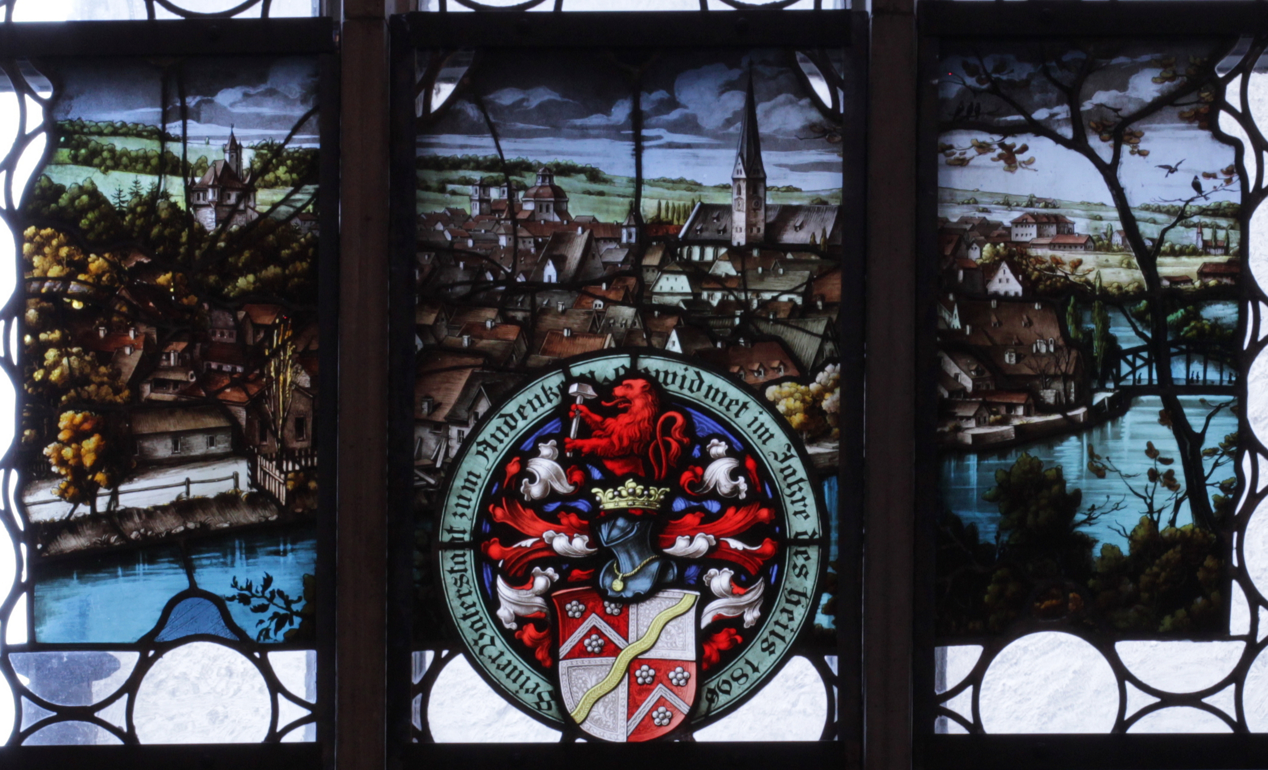 Stadtansicht auf einem Fenster in der St.-Mang-Kirche, Kempten